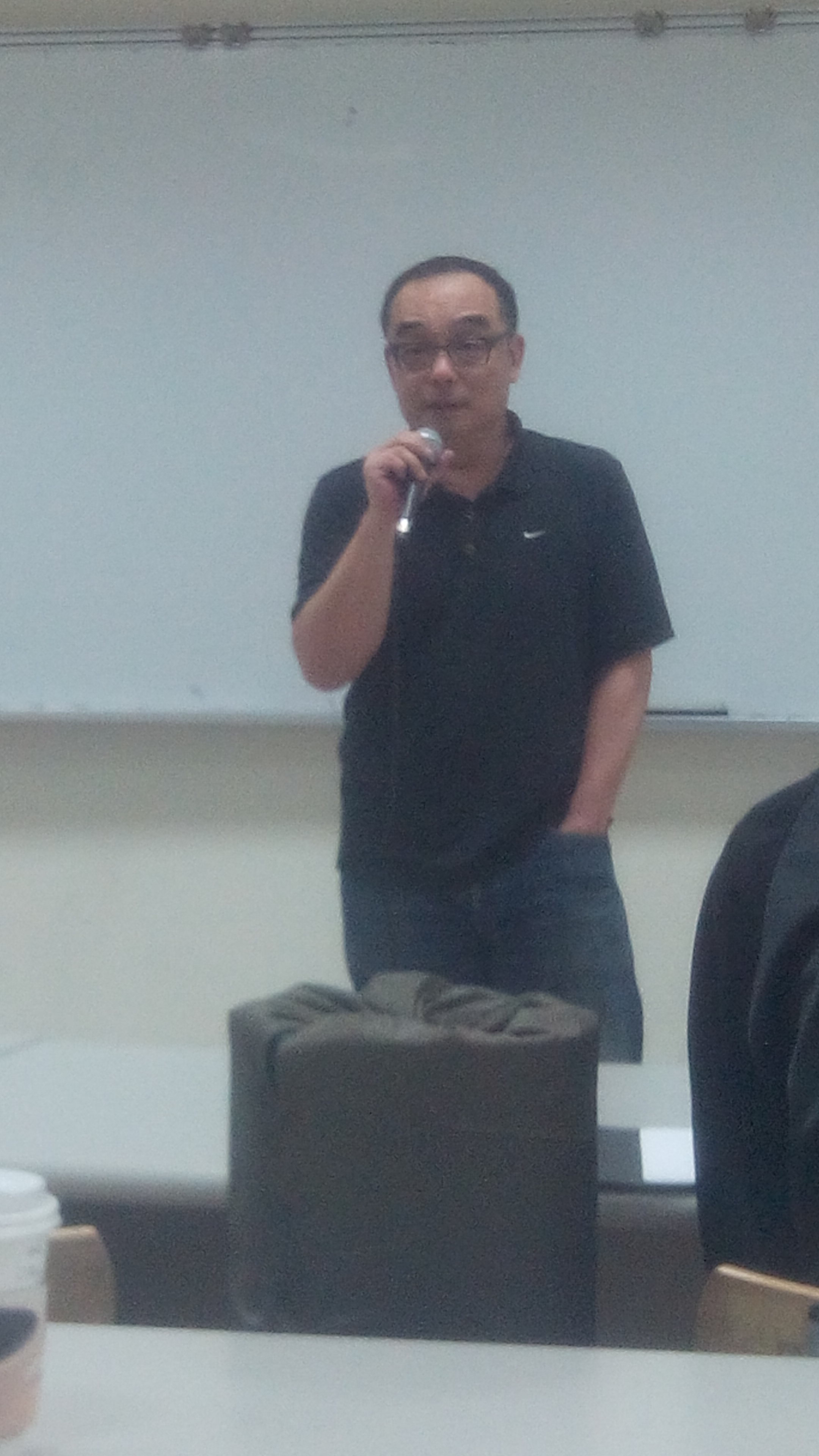 中文（台灣）: 易智言受邀到南台科技大學演講。